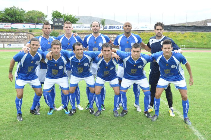 CD Marino podando antes de un partido contra el Corralejo el 4/09/2011